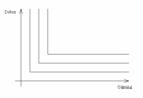 Tökéletes kiegészítés, illusztráció a Közömbösségi görbe cikkhez